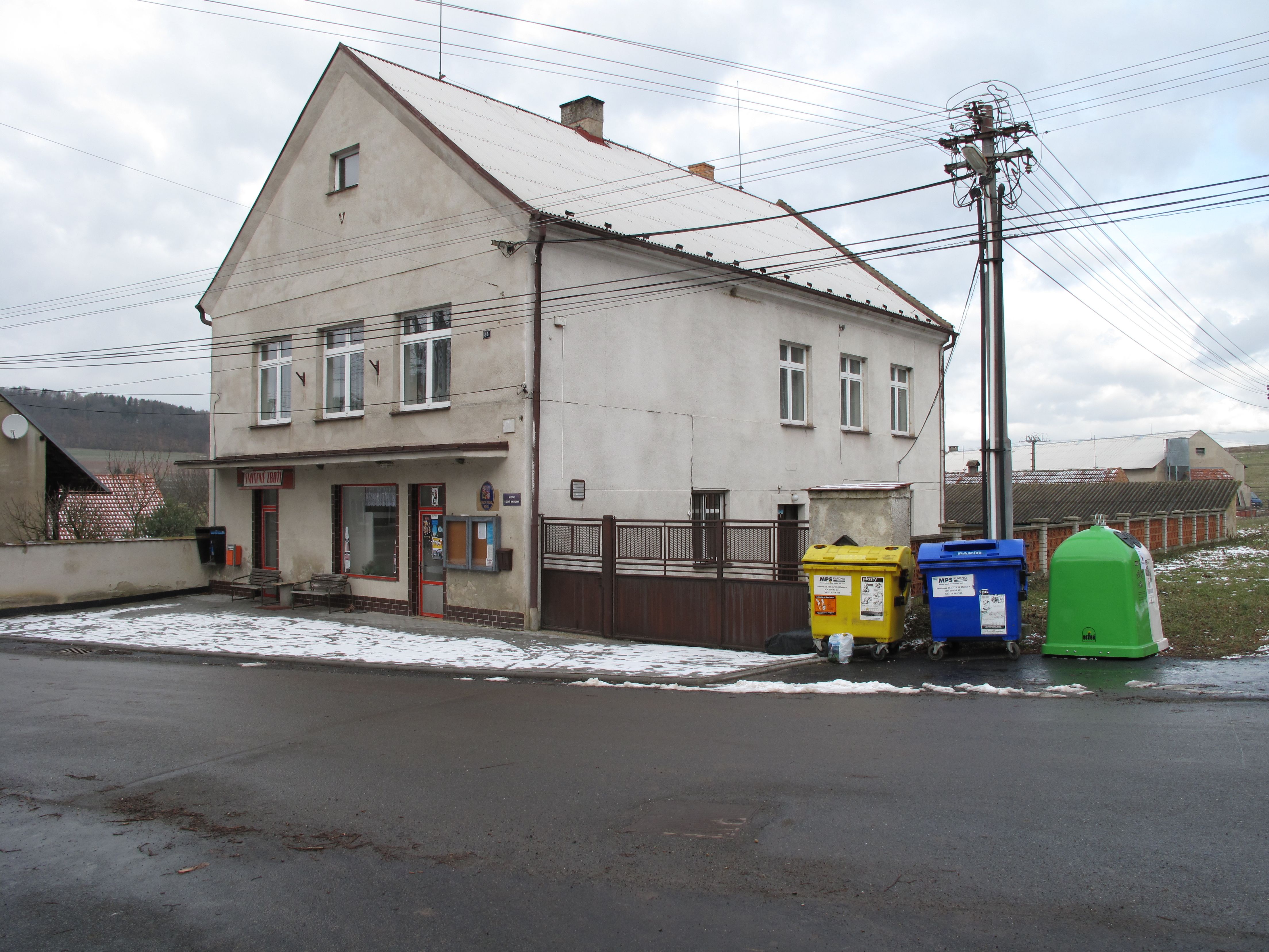 Obecní úřad v Bdíně. Okres Rakovník, Česká republika.